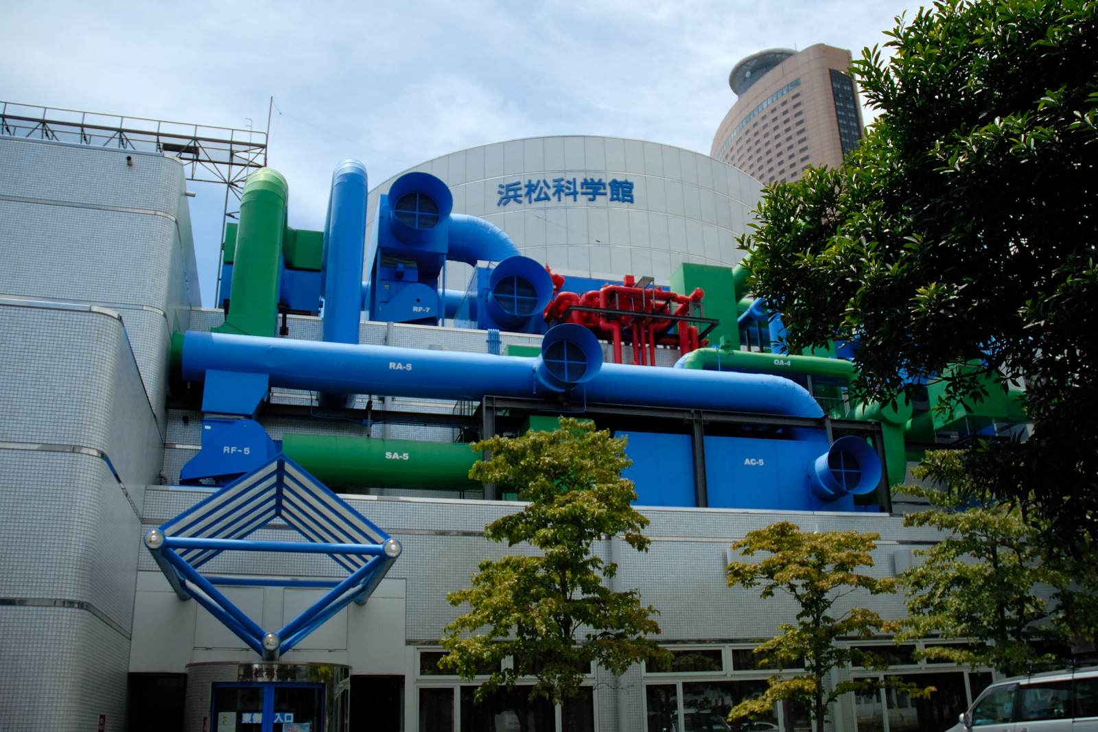 Hamamatsu Science Museum, Hamamatsu, Japan